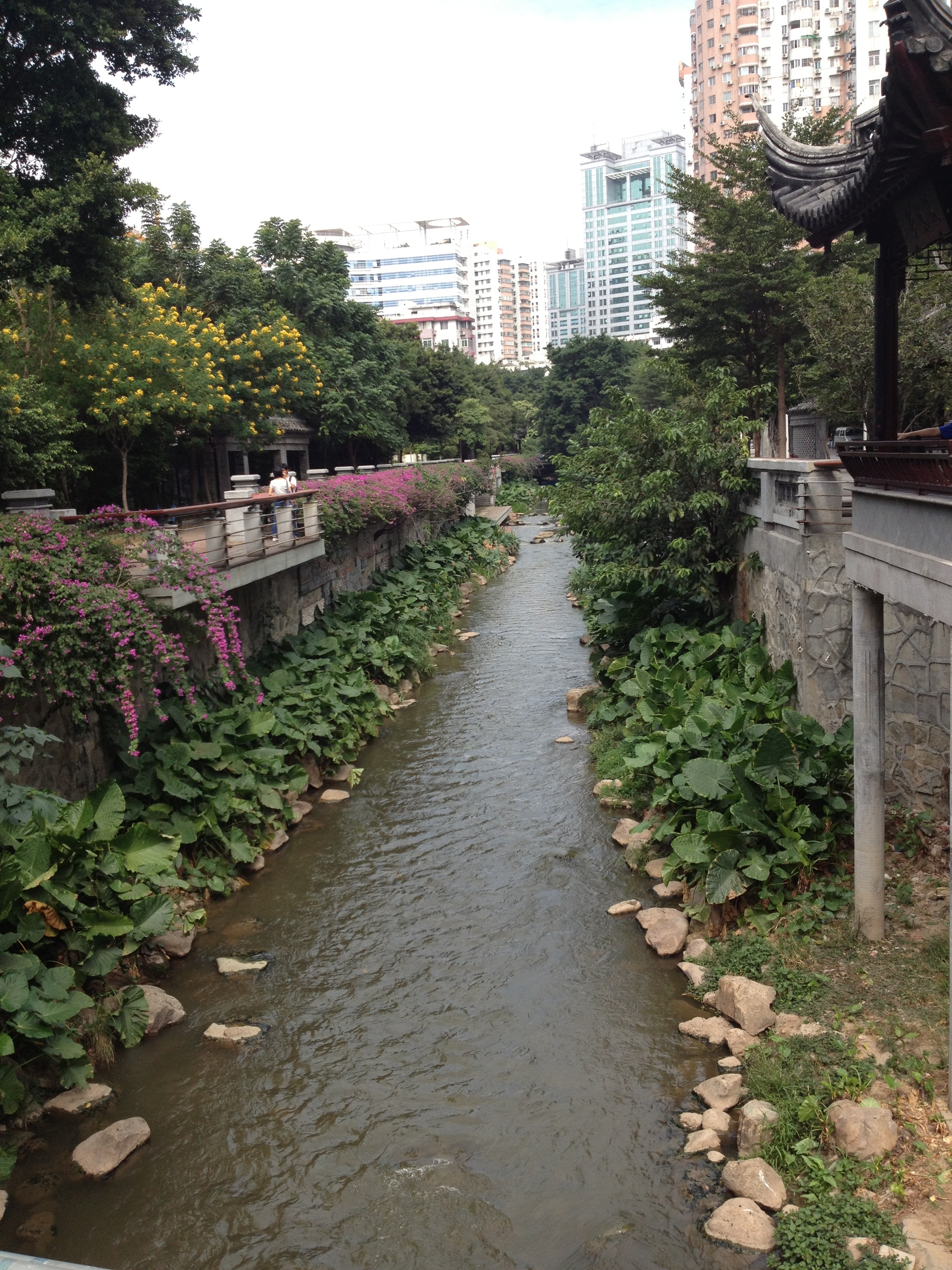 猎德涌，天河北路以北部分。